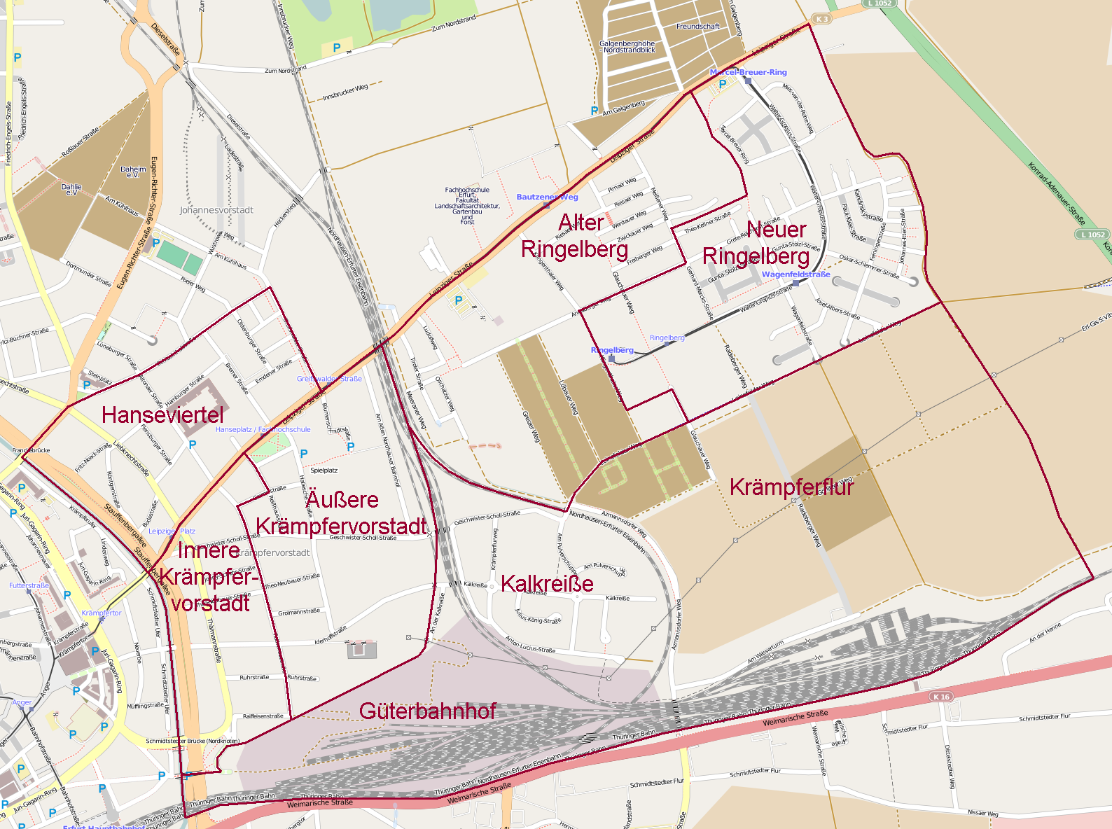 Eine Karte der Viertel im Stadtteil Krämpfervorstadt von Erfurt.